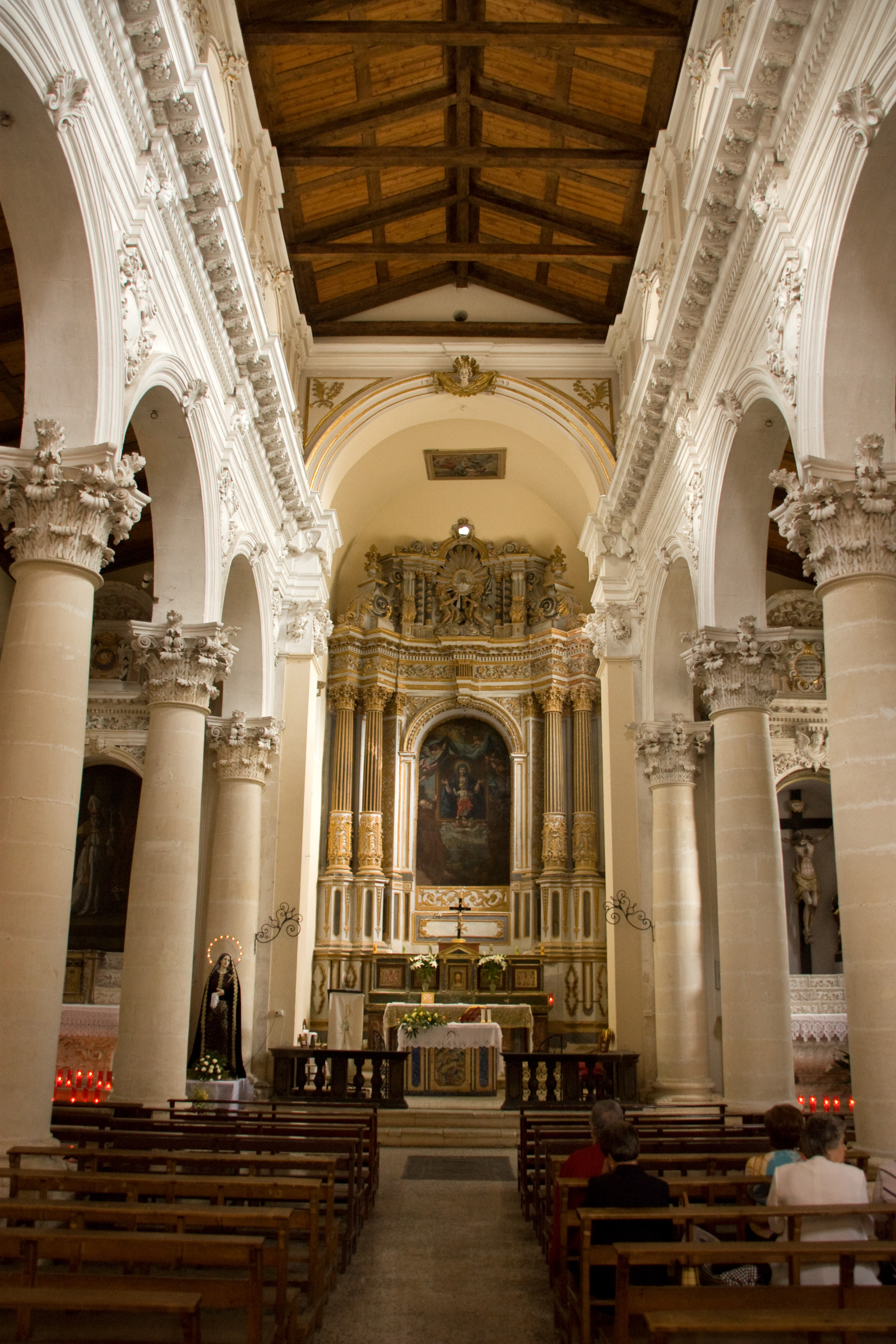 Chiesa Santa Maria dell'Idria, Ragusa Ibla, Sicile, Italie